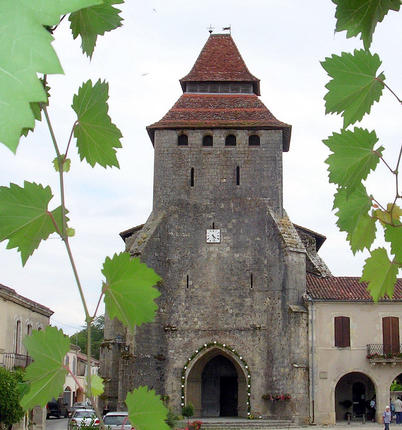 Labastide-d'Armagnac (Landes, France)